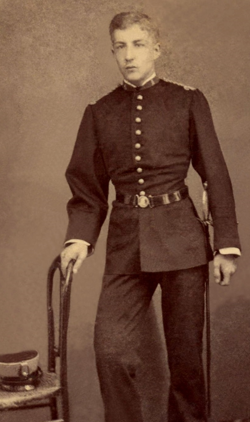 Cadete de la Academia Militar española, a finales del siglo XIX.